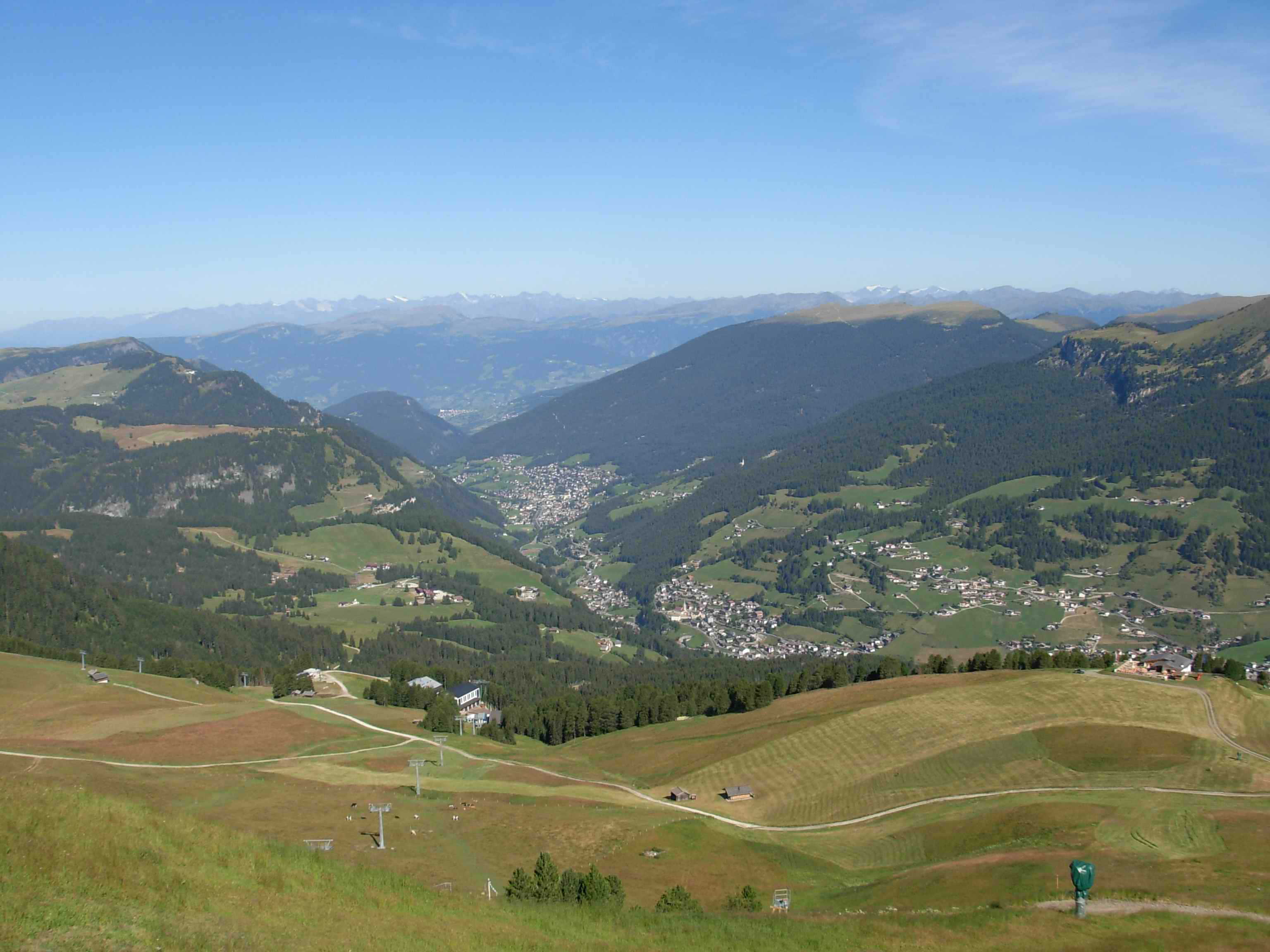 Gröden in Südtirol